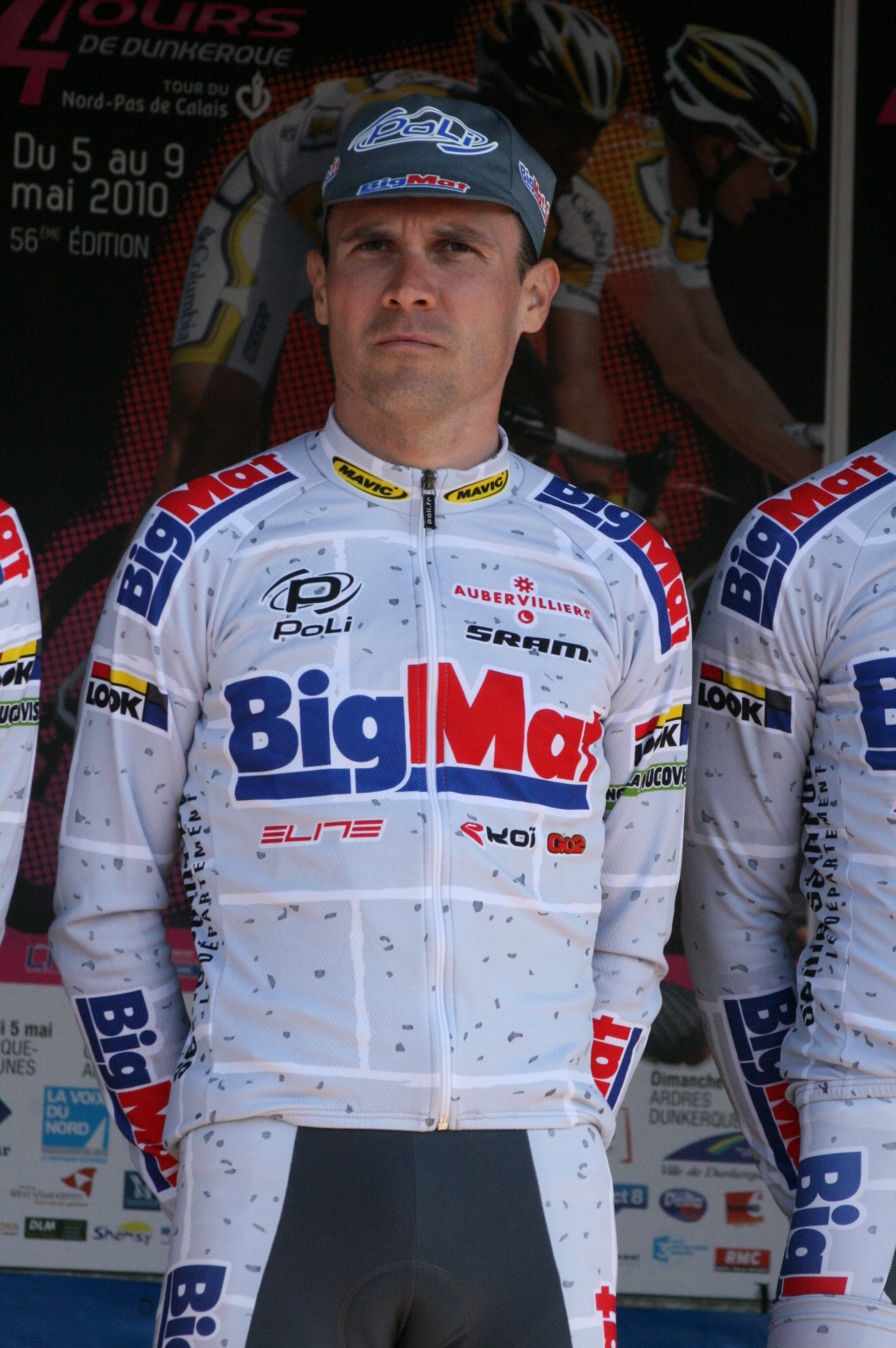 Maxime Méderel lors de la présentation des équipes des 4 jours de Dunkerque 2010